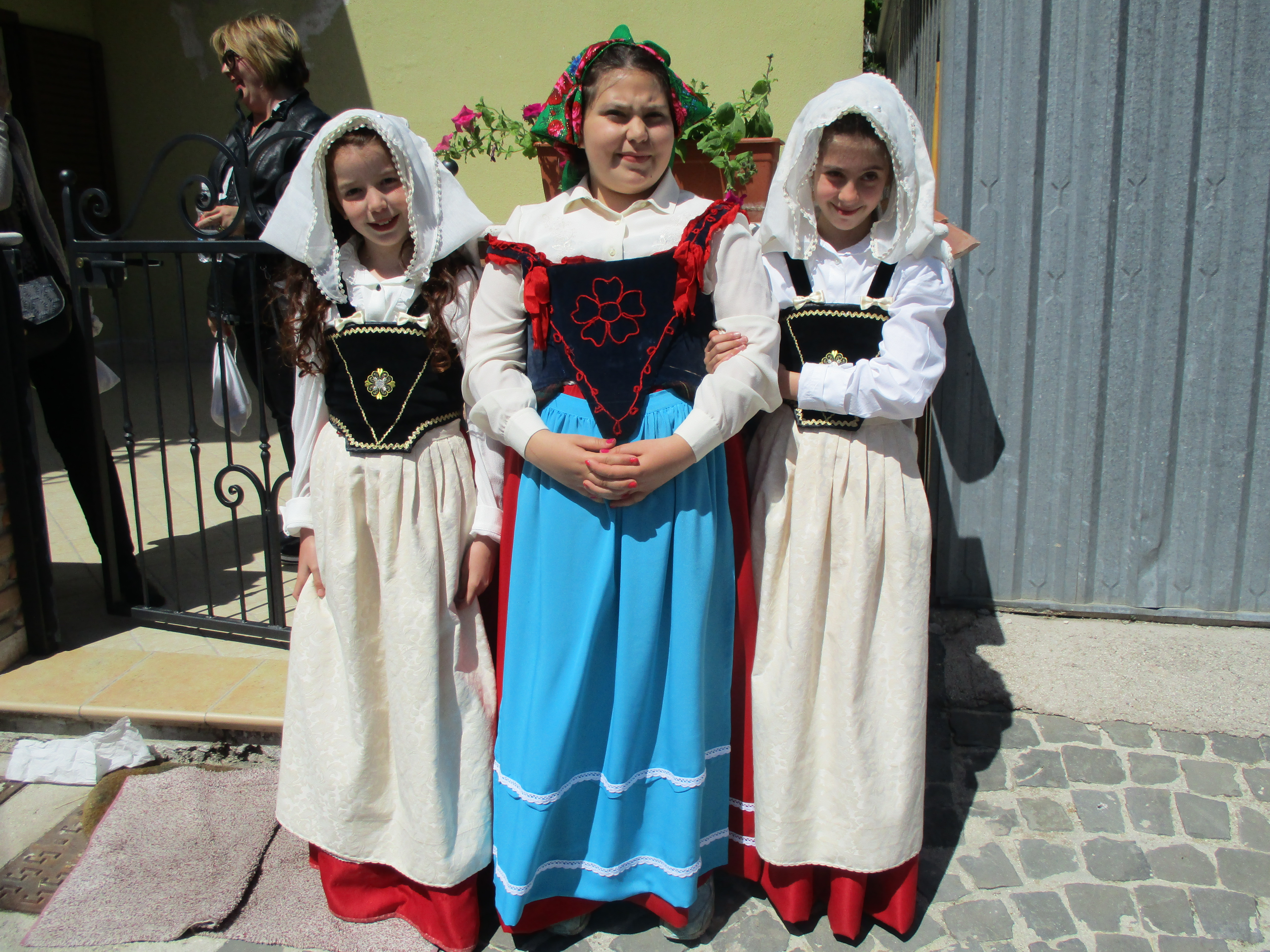 Bambine indossano abiti tradizionali